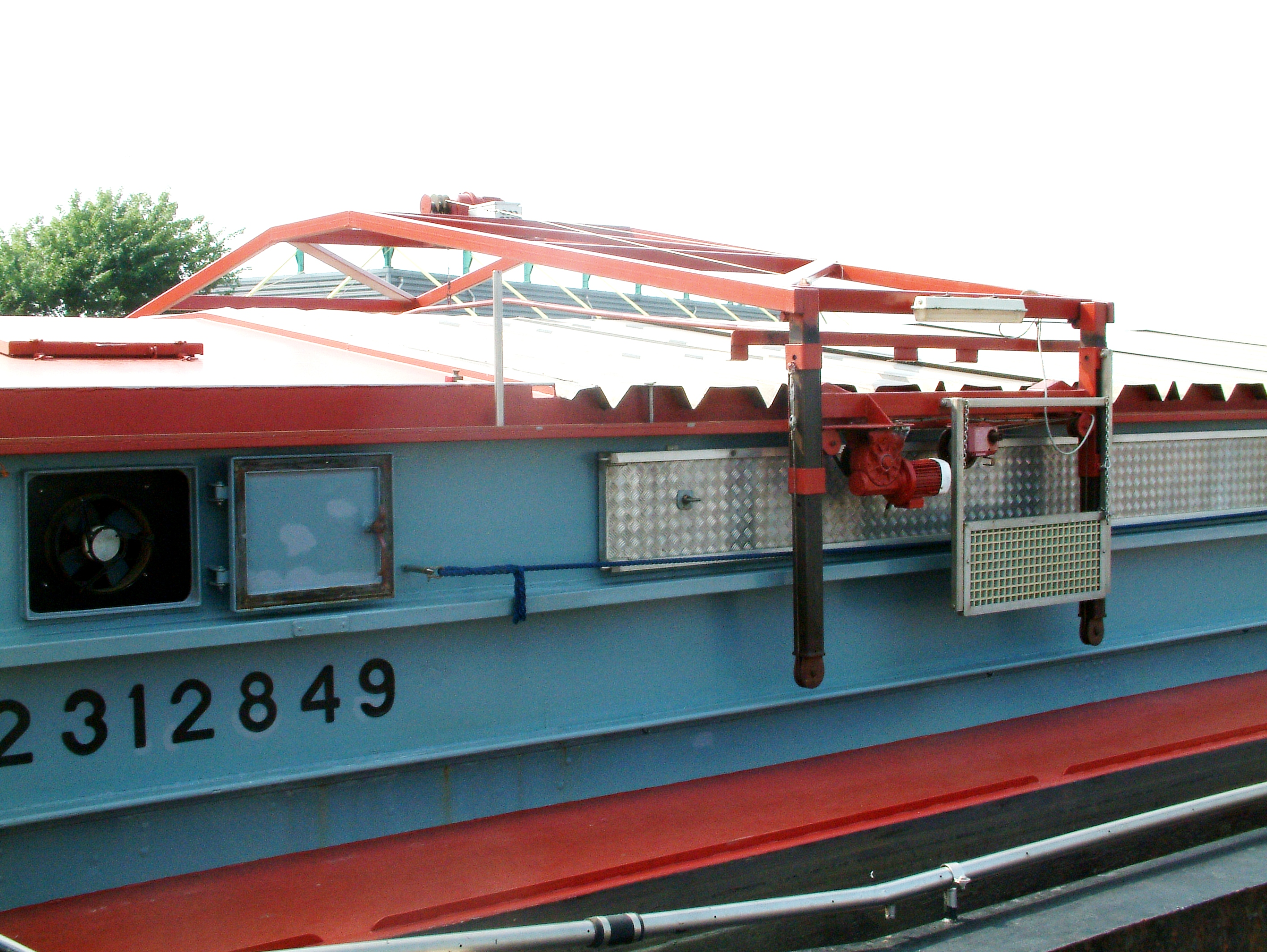 Een luikenwagen voor het verplaatsen en stapelen van aluminium scheepsluiken. In dit geval van het m.s. Federatie.